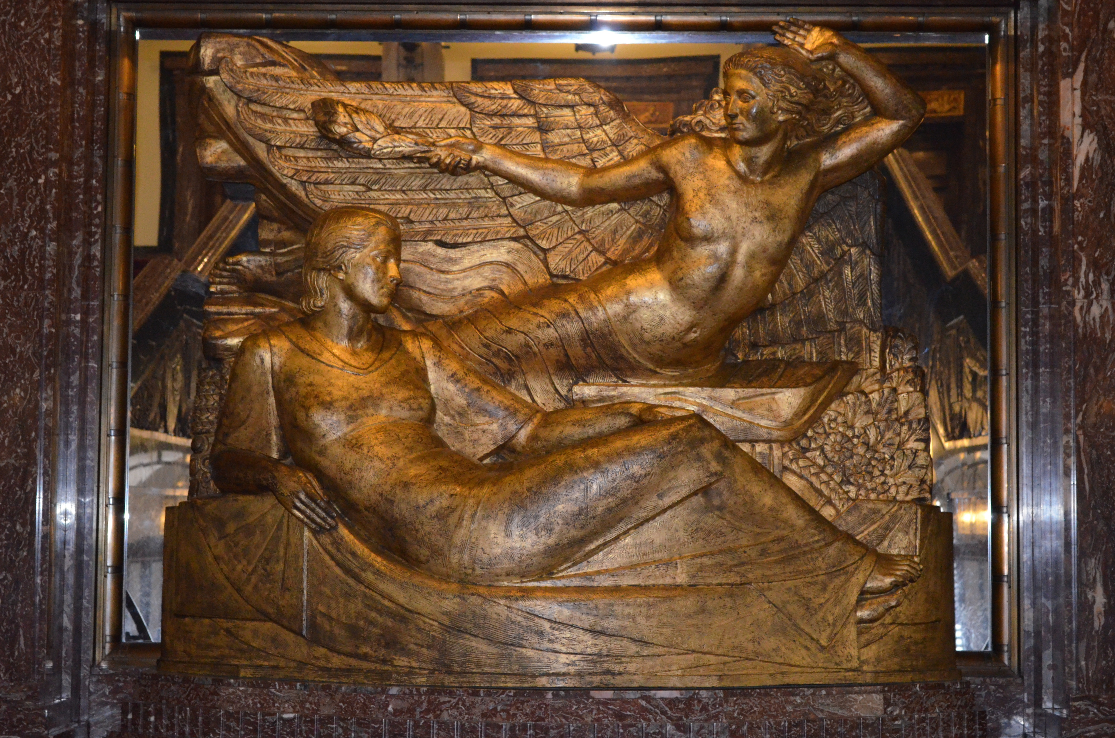 Sculpture de style Art déco